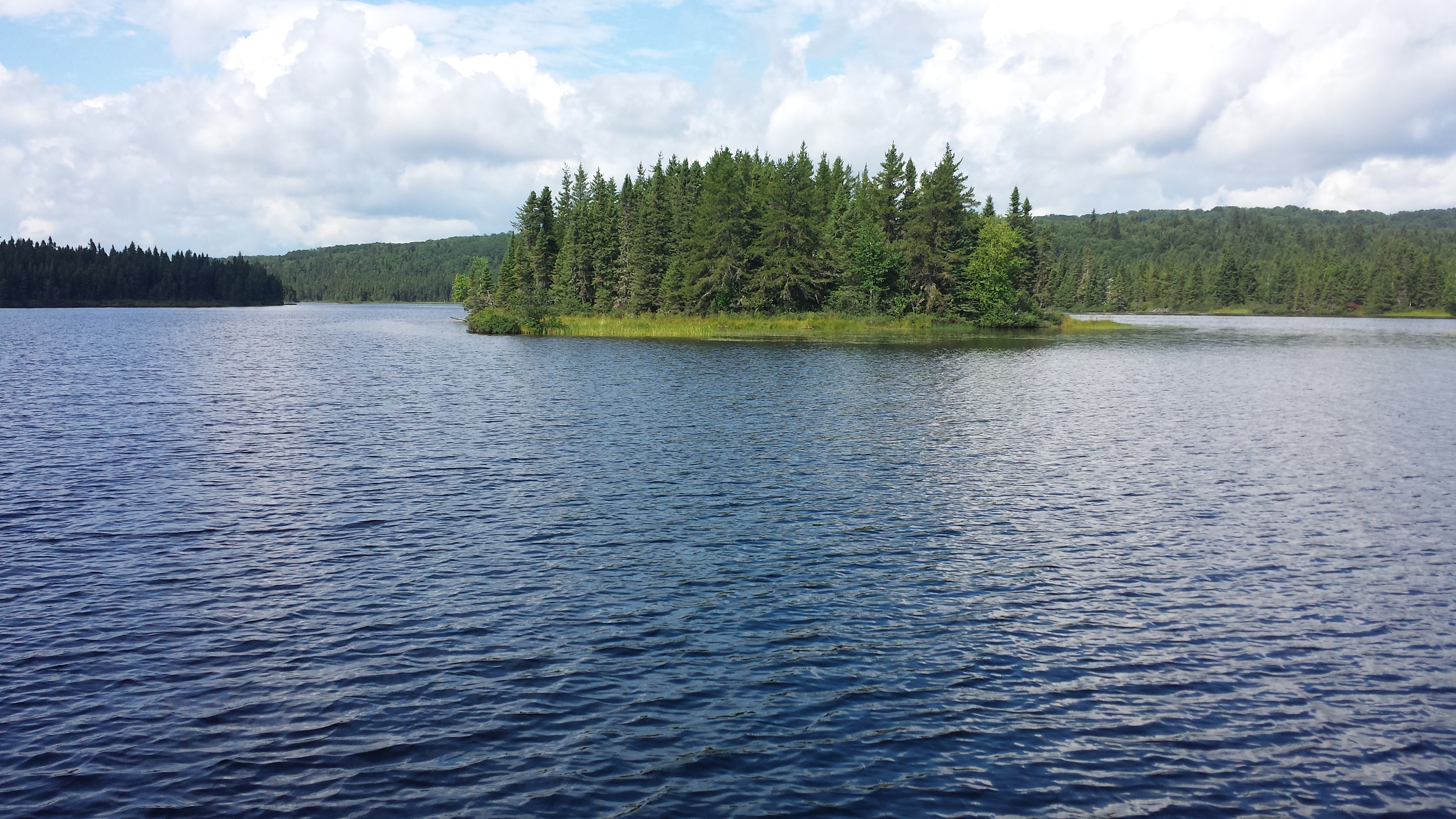 Île sauvage non identifiée sur le Réservoir Blanc (situé en Haute-Mauricie, au Québec, au Canada).